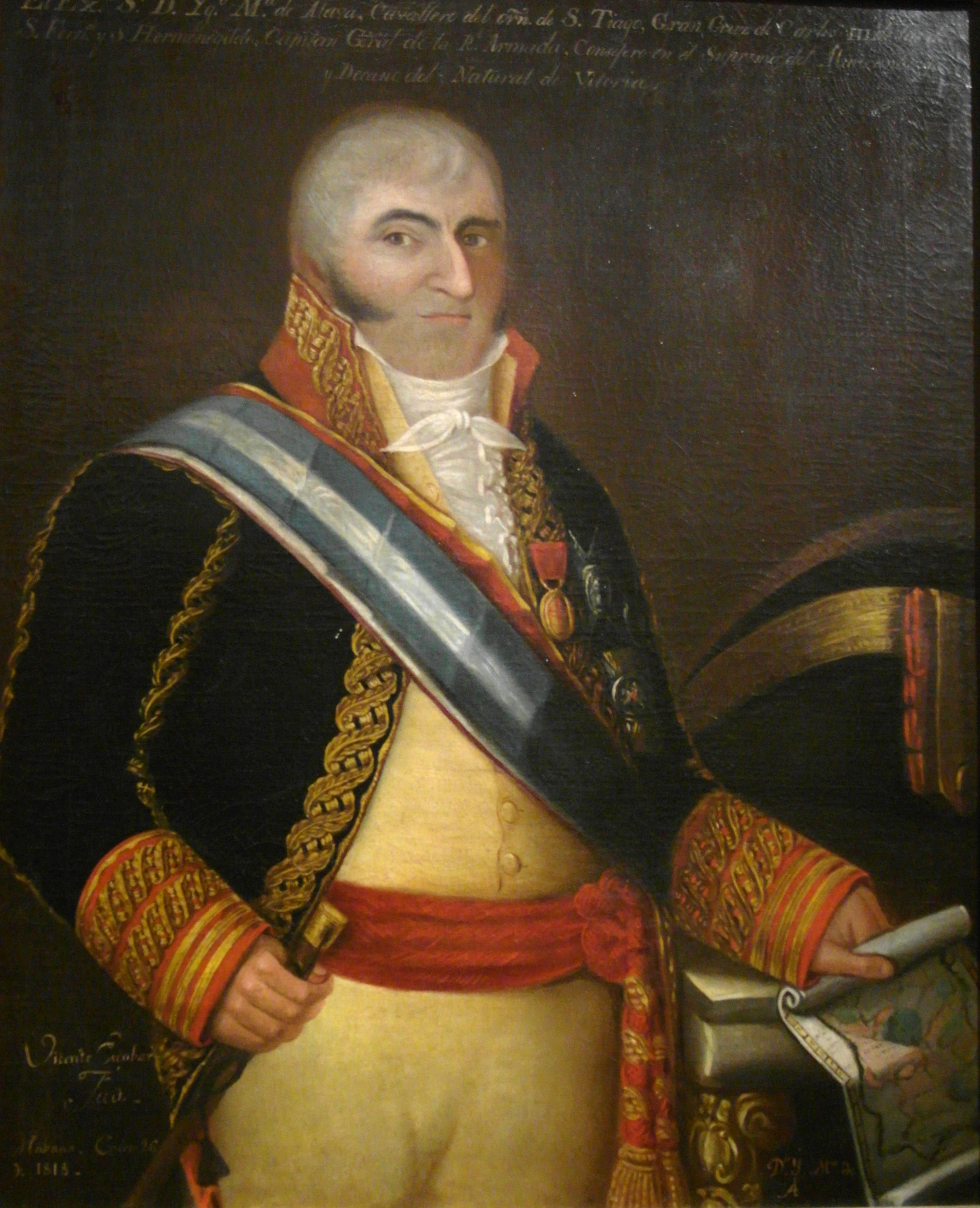 Retrato de Ignacio María de Álava (1750-1817), que combatió en la batalla de Trafalgar y llegó a ser capitán general de la Real Armada Española y caballero de la Orden de Santiago. El retratado aparece en pie y mirando hacia la izquierda, y con su mano derecha sostiene un bastón mientras que la izquierda lleva un mapa de España. Además, sobre una mesa está su sombrero, viste uniforme de teniente general y de director de la Armada, y luce las bandas y las placas de las ordenes de Carlos III, San Fernando y San Hermenegildo y la venera de la Orden de Santiago.